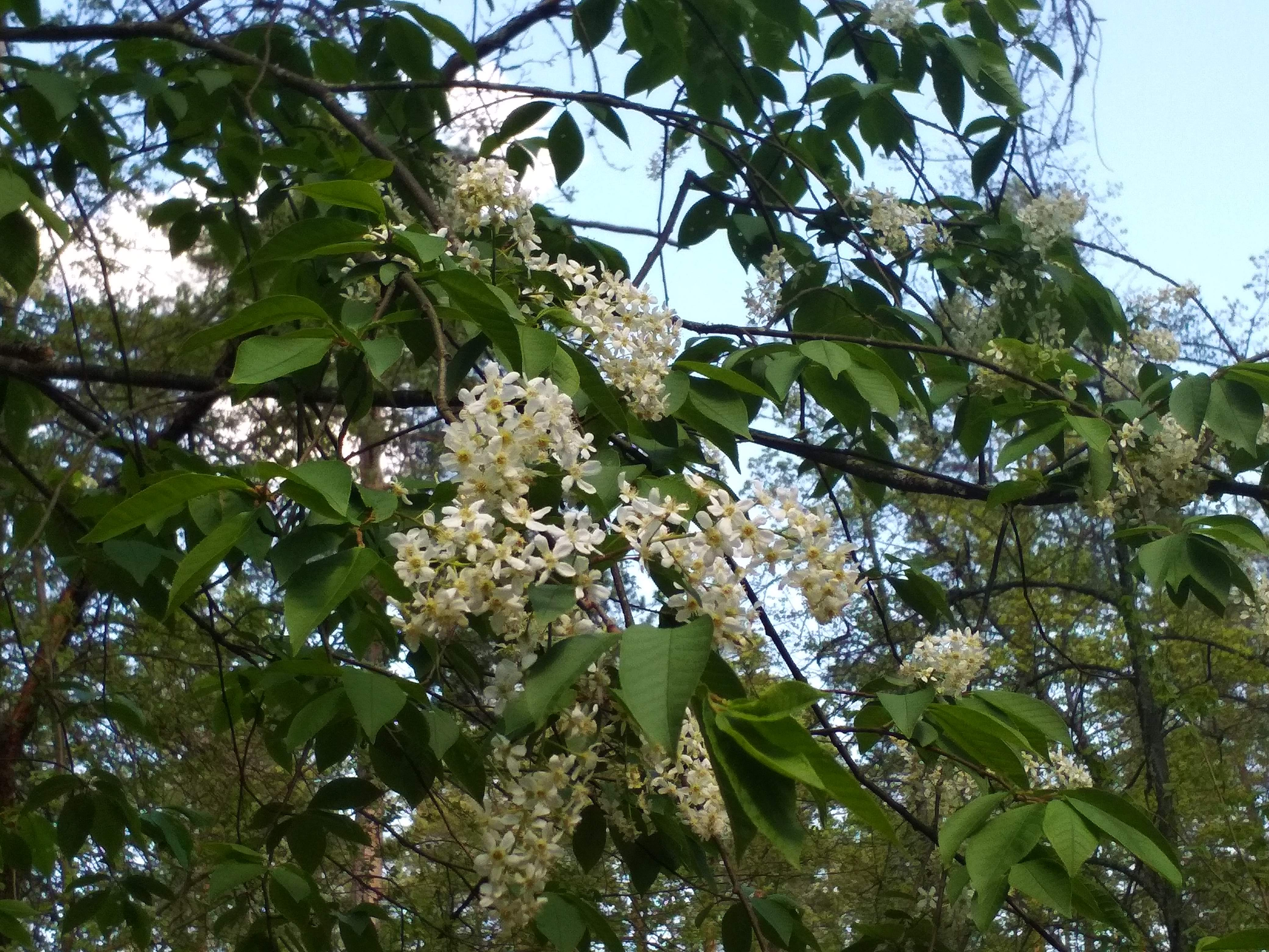 Воронежский заповедник: Территория заповедника расположена на границе Воронежской (Верхнехавский р-н) и Липецкой (Усманский р-н) областей и занимает северную половину островного лесного массива – Усманского бора., Верхнехавский район, Воронежская область This image is related to the protected area of Russia number 3600069